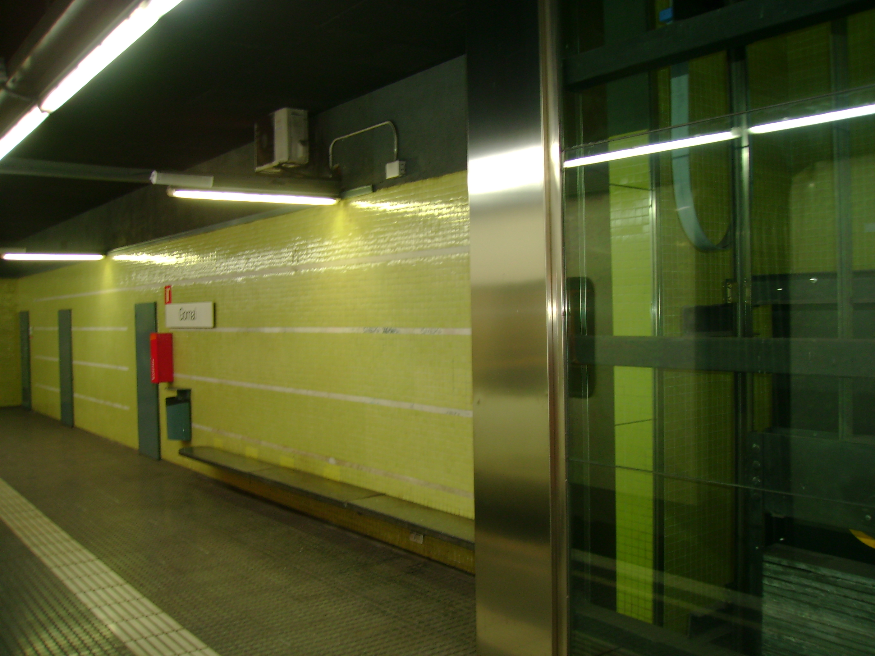 Foto capturada per la meva càmara a l'estació de Gornal (FGC).